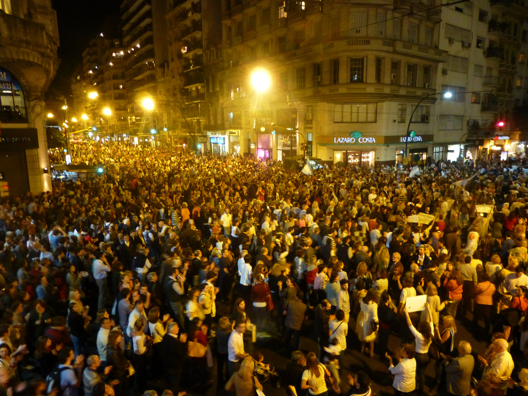 Cacerolazo en Avenida Santa Fe y Callao (Jueves 19 de Septiembre)